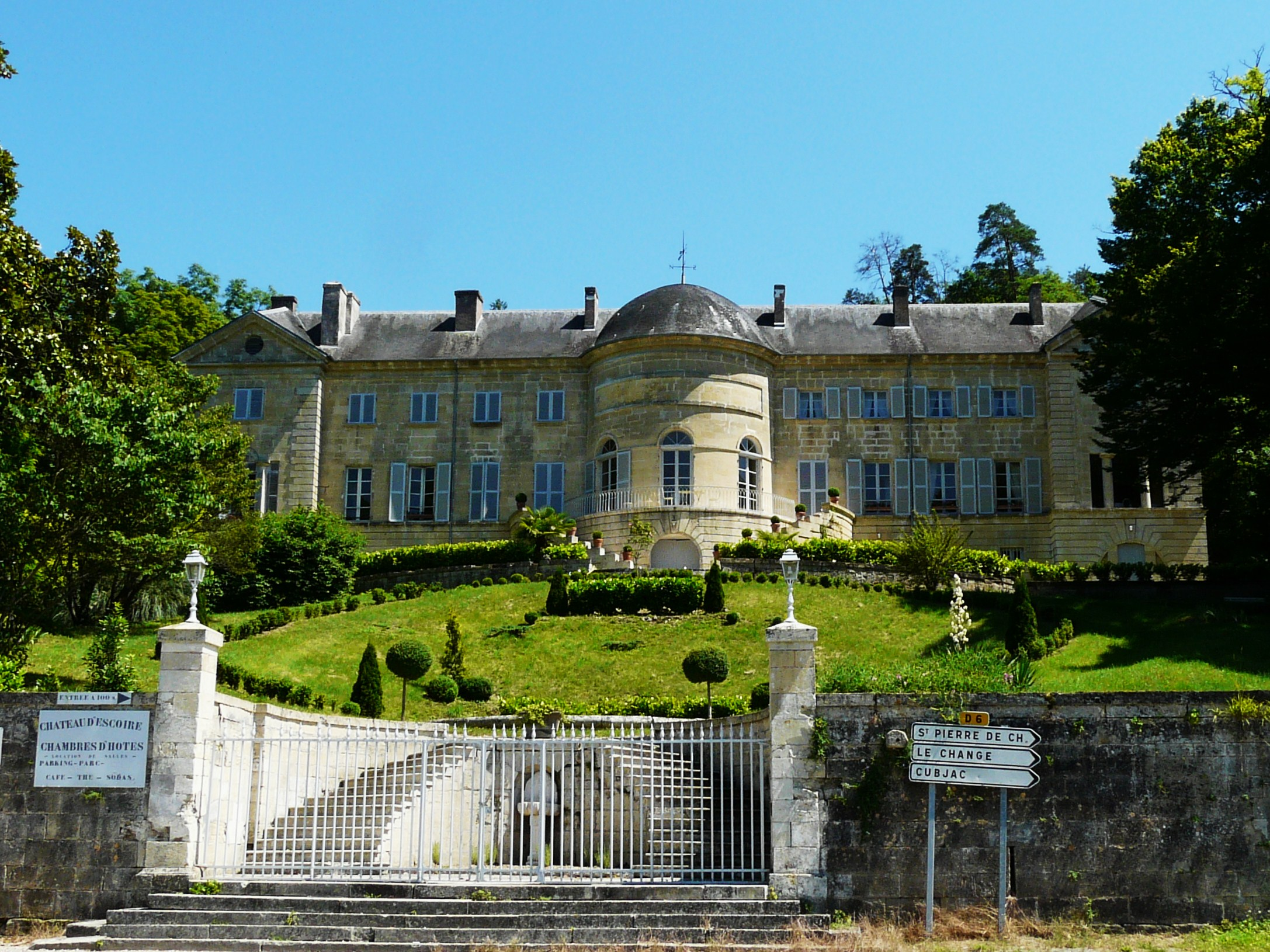 Château d'Escoire, Dordogne, France Object location45° 12′ 23″ N, 0° 50′ 46.8″ E